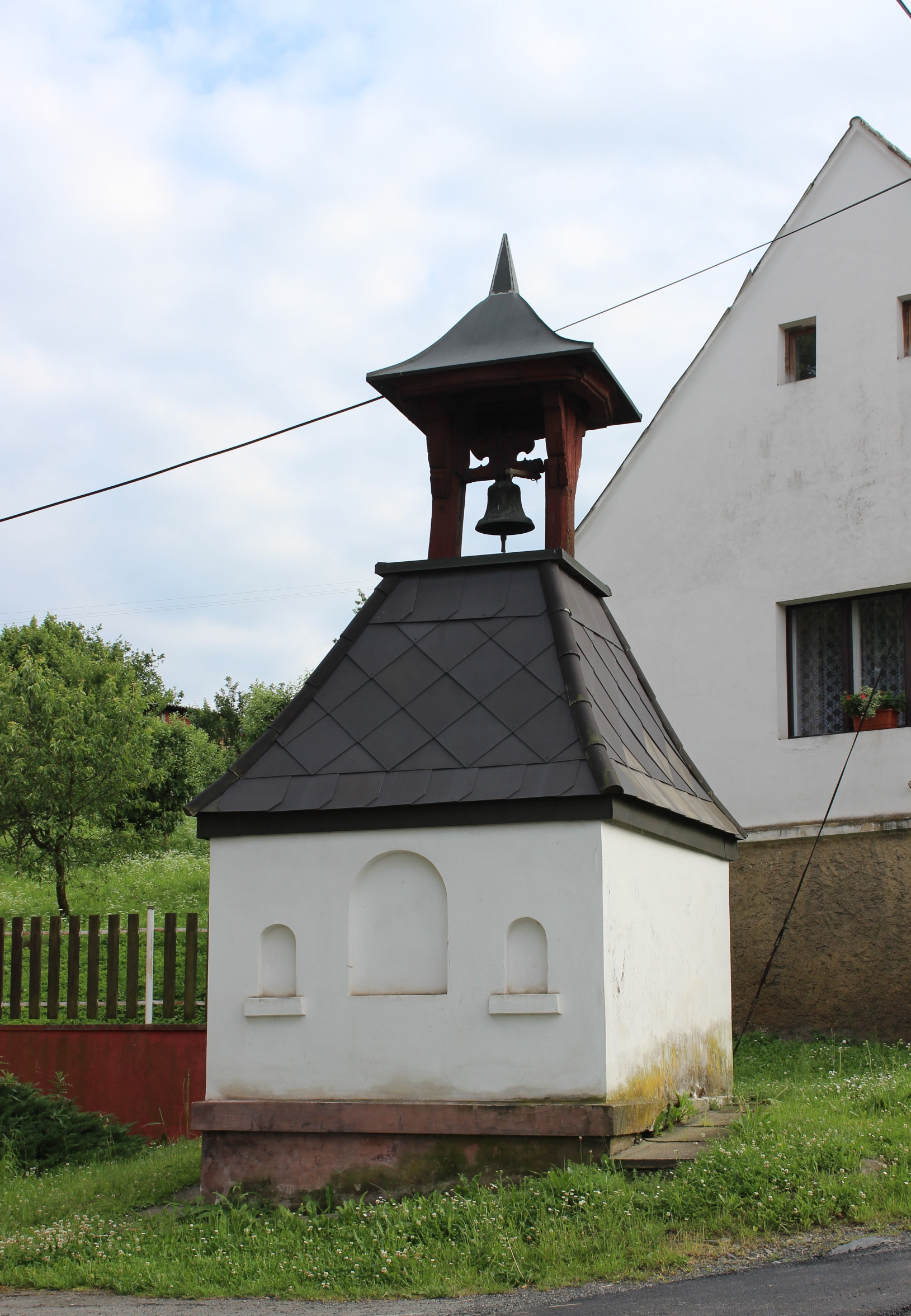 Kaplička v Ryšíně, částli Pavlíkova (pohled od severu).